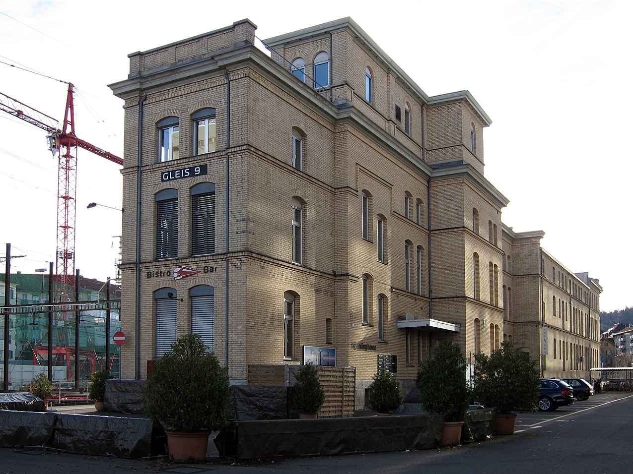 "Gleis 9": ehemaliges Verwaltungsgebäude der Werkzeug- und Maschinenfabrik Oerlikon (MFO) in Zürich-Oerlikon: Baujahr 1869 mit Erweiterungen Architekt Carl Arnold Séquin, Bauherrschaft Maschinenfabrik Oerlikon (MFO): Inventar der schützenswerten Bauten von kommunaler Bedeutung der Stadt Zürich 2019)